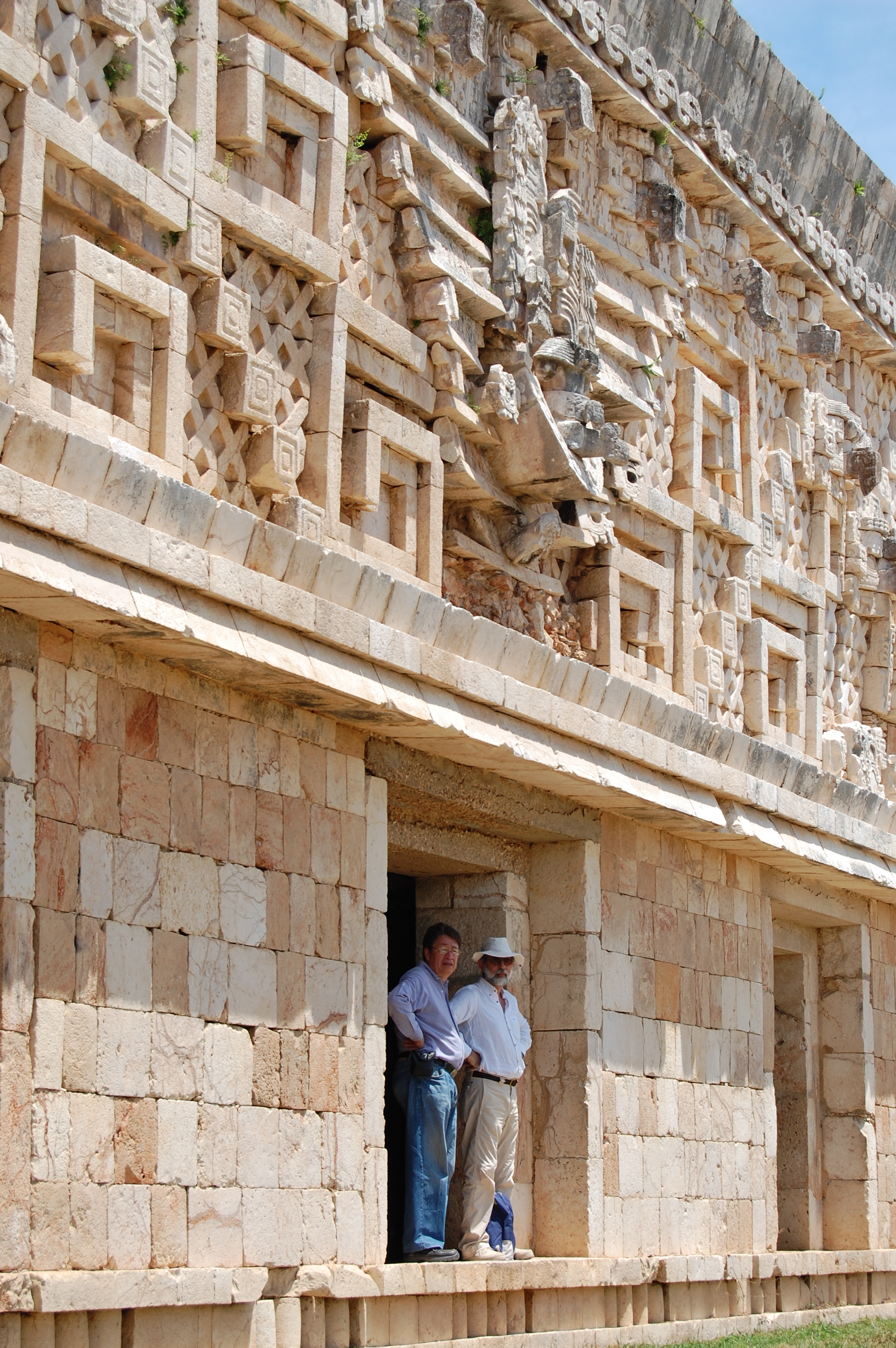 Uxmal, Mexico Palacio del Gobernador